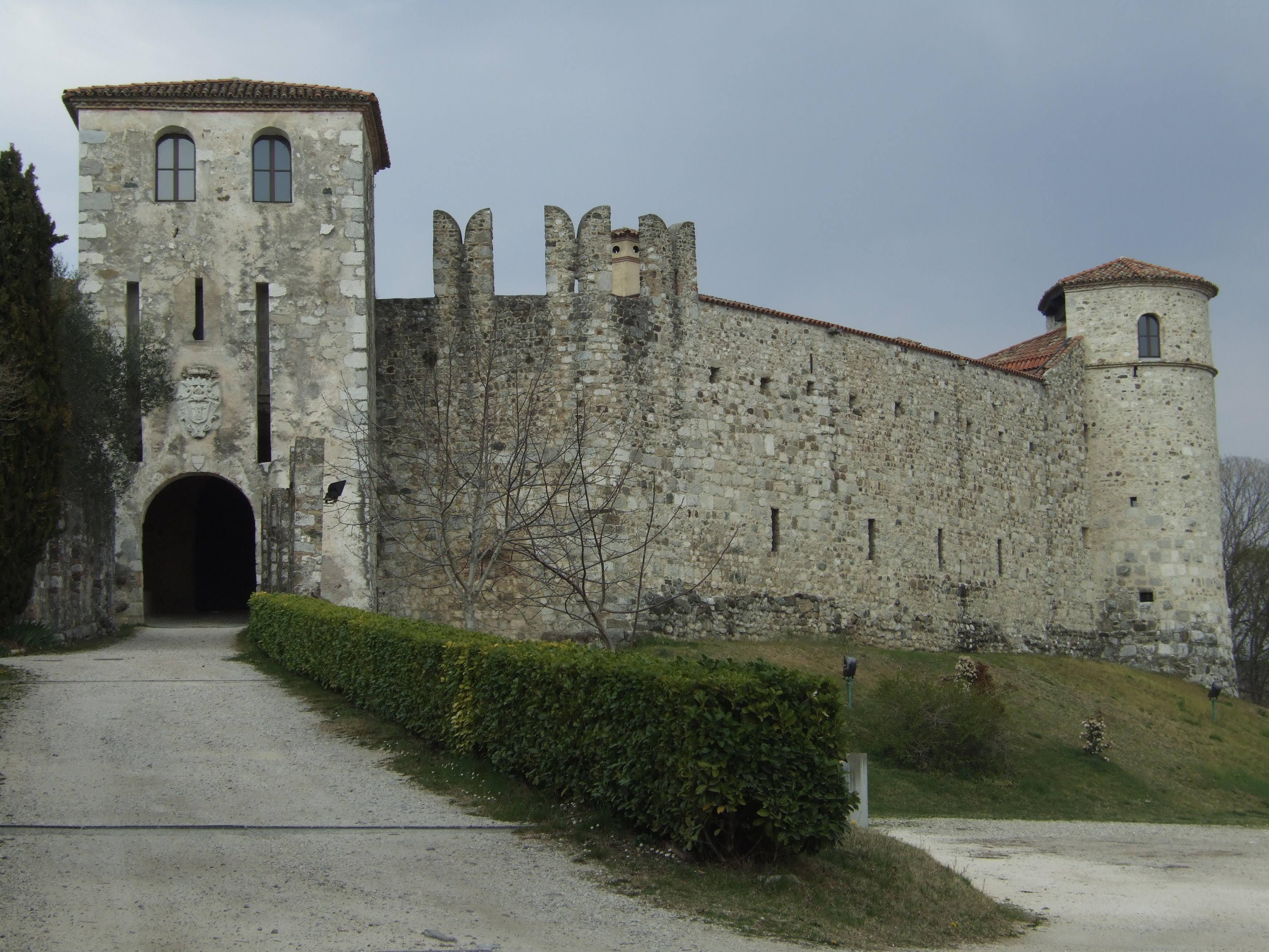 Fagagna (Udine) - Castello di Villalta